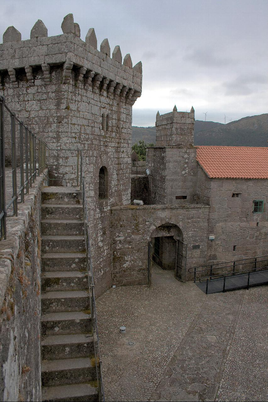 Castelo de Vimianzo. Torre e porta de acceso.